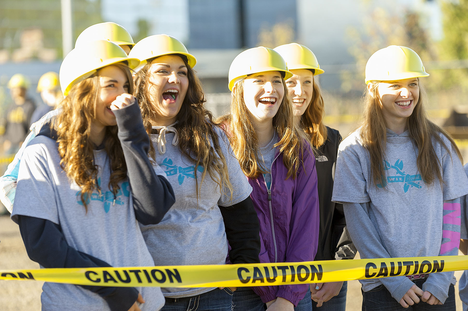 Sharing a laugh